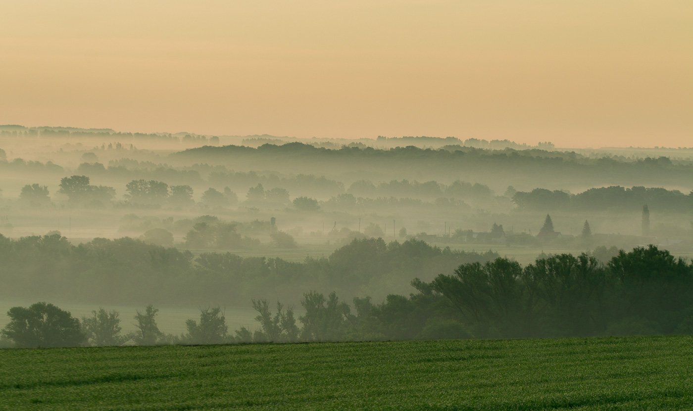 Землянский заказник: Семилукский район, Воронежская область This image is related to the protected area of Russia number 3610207